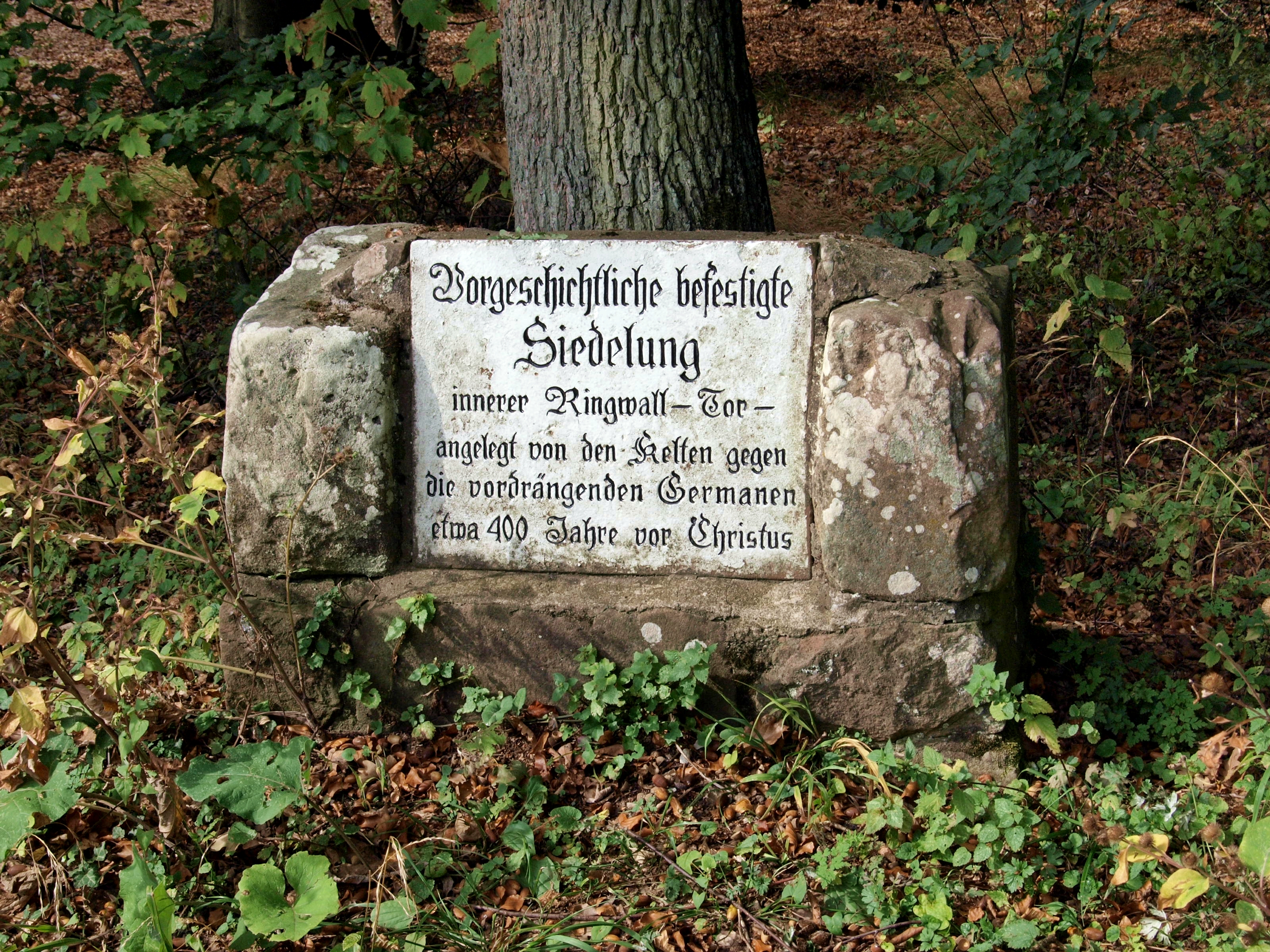 Keltischer Ringwall auf dem Heiligenberg bei Heidelberg